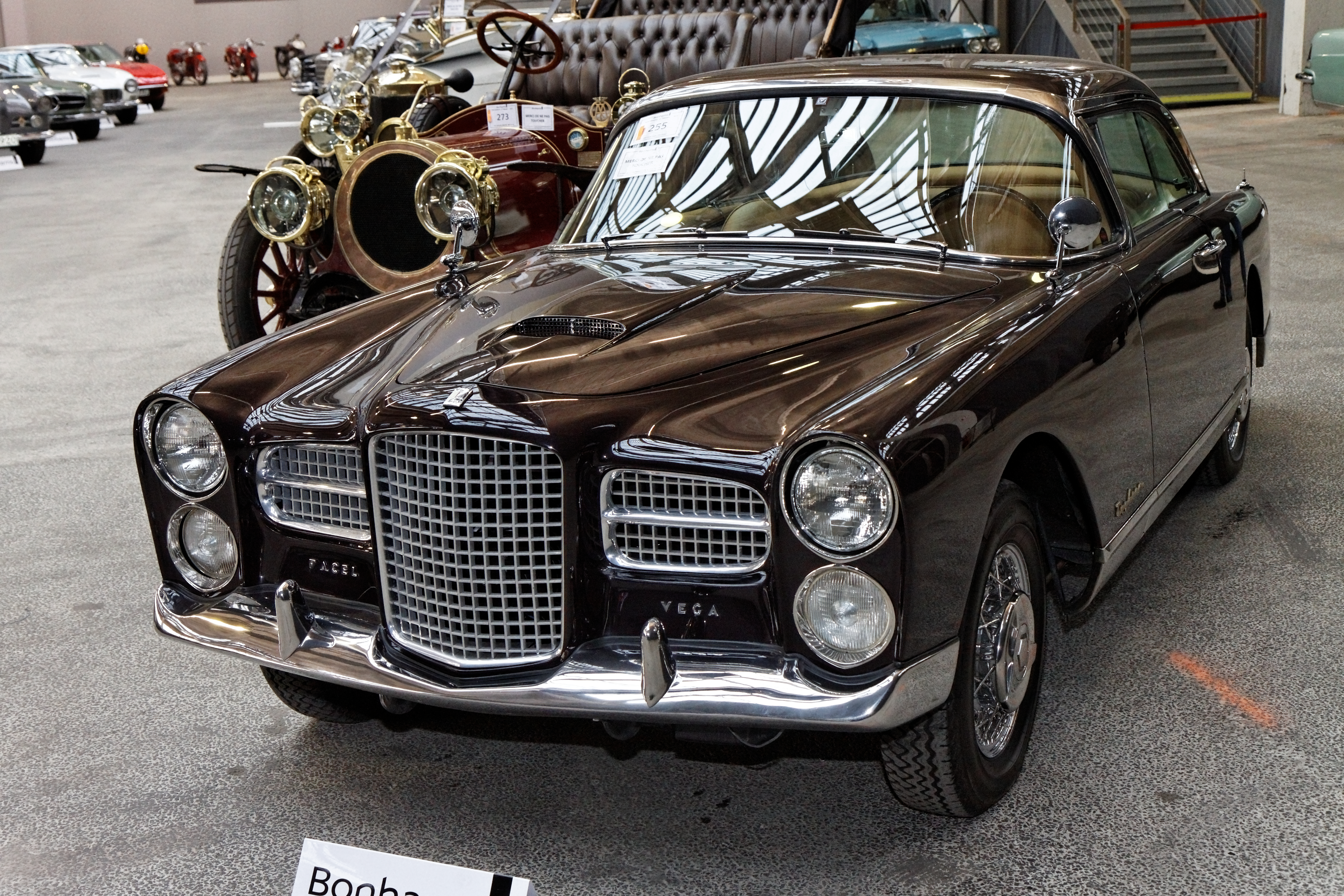 Facel Vega FV4 Coupé